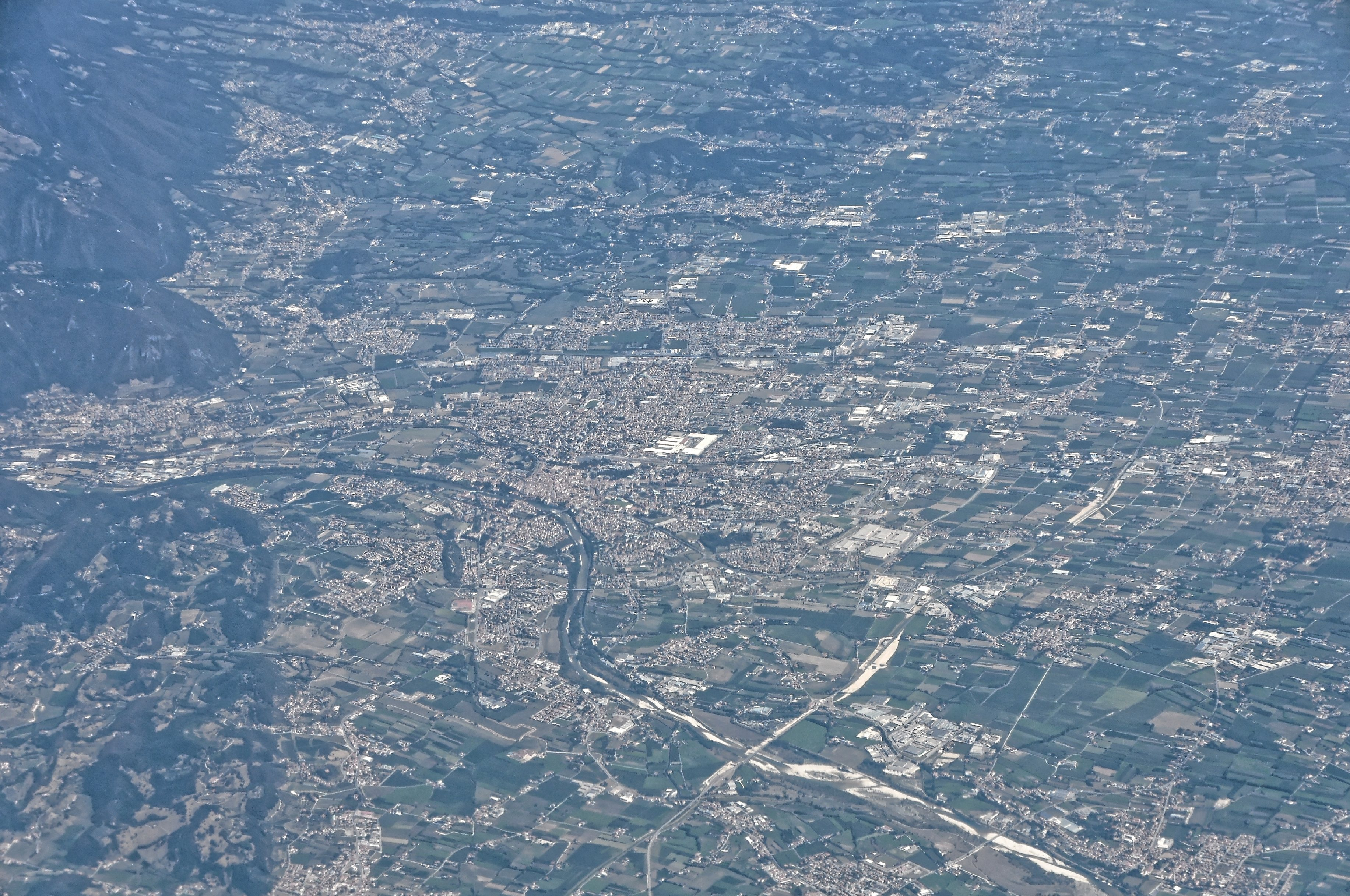 Bilder vom Flug -Rom-Düsseldorf-Hamburg 2013 Dieses Foto entstand in Zusammenarbeit mit Stadtbesichtigungen.de Die Seiten Stadtbesichtigungen.de, der dazugehörige Reise Blog sowie die Facebookseite: Stadtbesichtigungen Rom dürfen dieses Bild für Ihre Veröffentlichungen ohne den Hinweis auf Wikipedia, Commons bzw der Lizenz verwenden. Die Verantwortlichen habe von mir (Ra Boe) die Originaldaten zur freien Verfügung übermittelt bekommen.